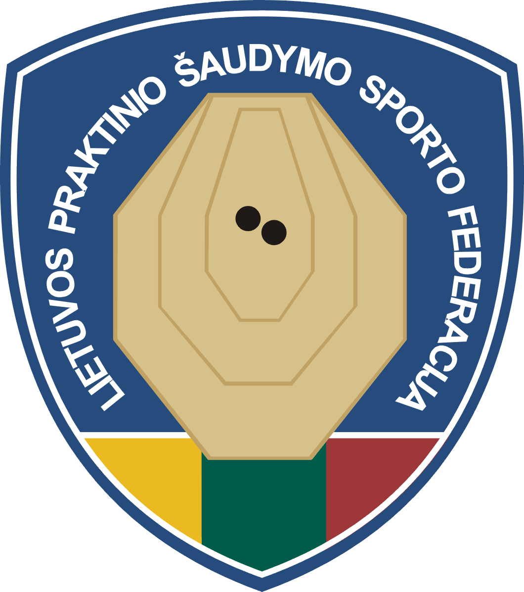 LPŠSF logotipas